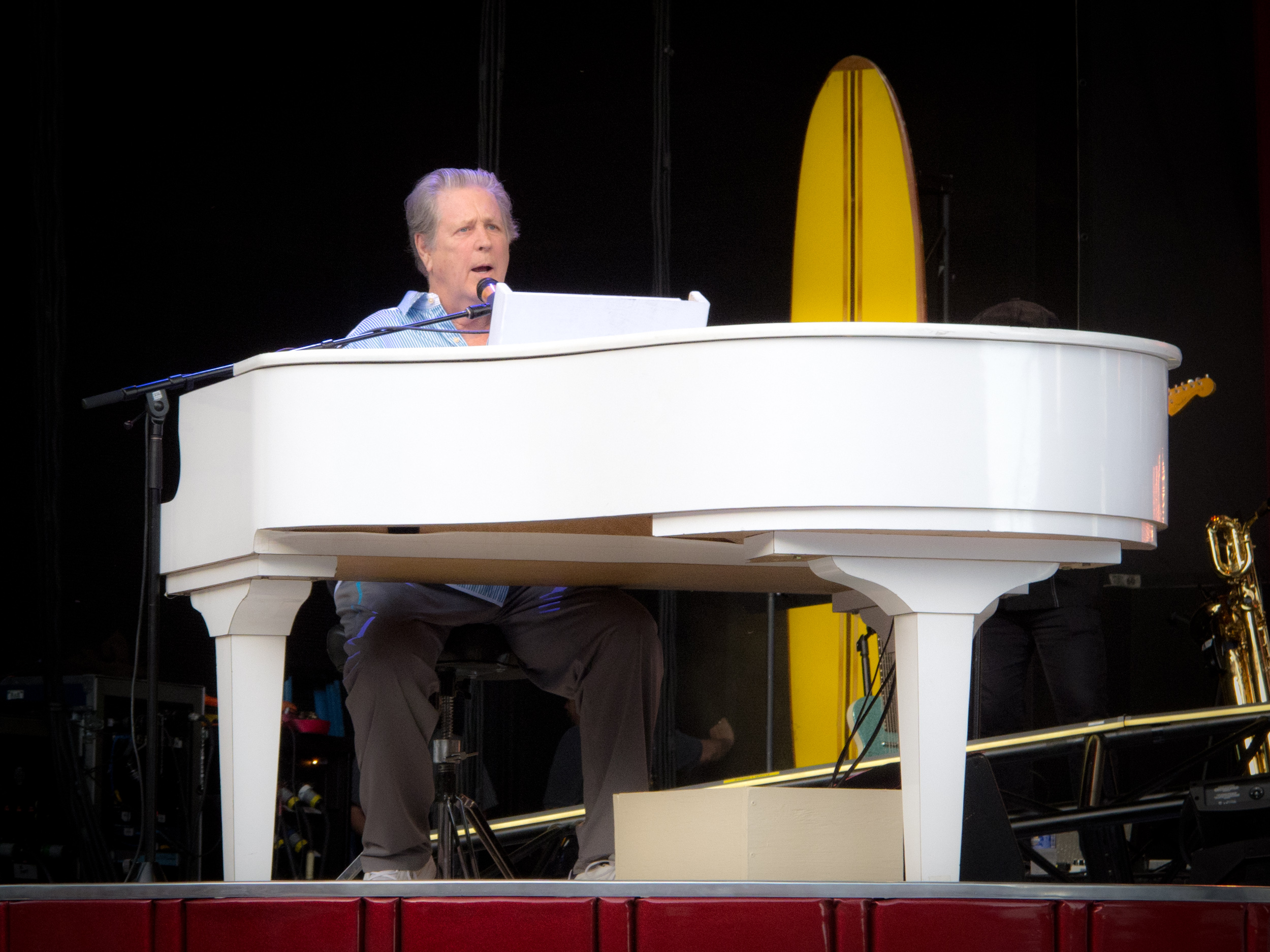 Brian Wilson en piano con The Beach Boys. En el Santa Barbara Bowl (Santa Barbara, California).